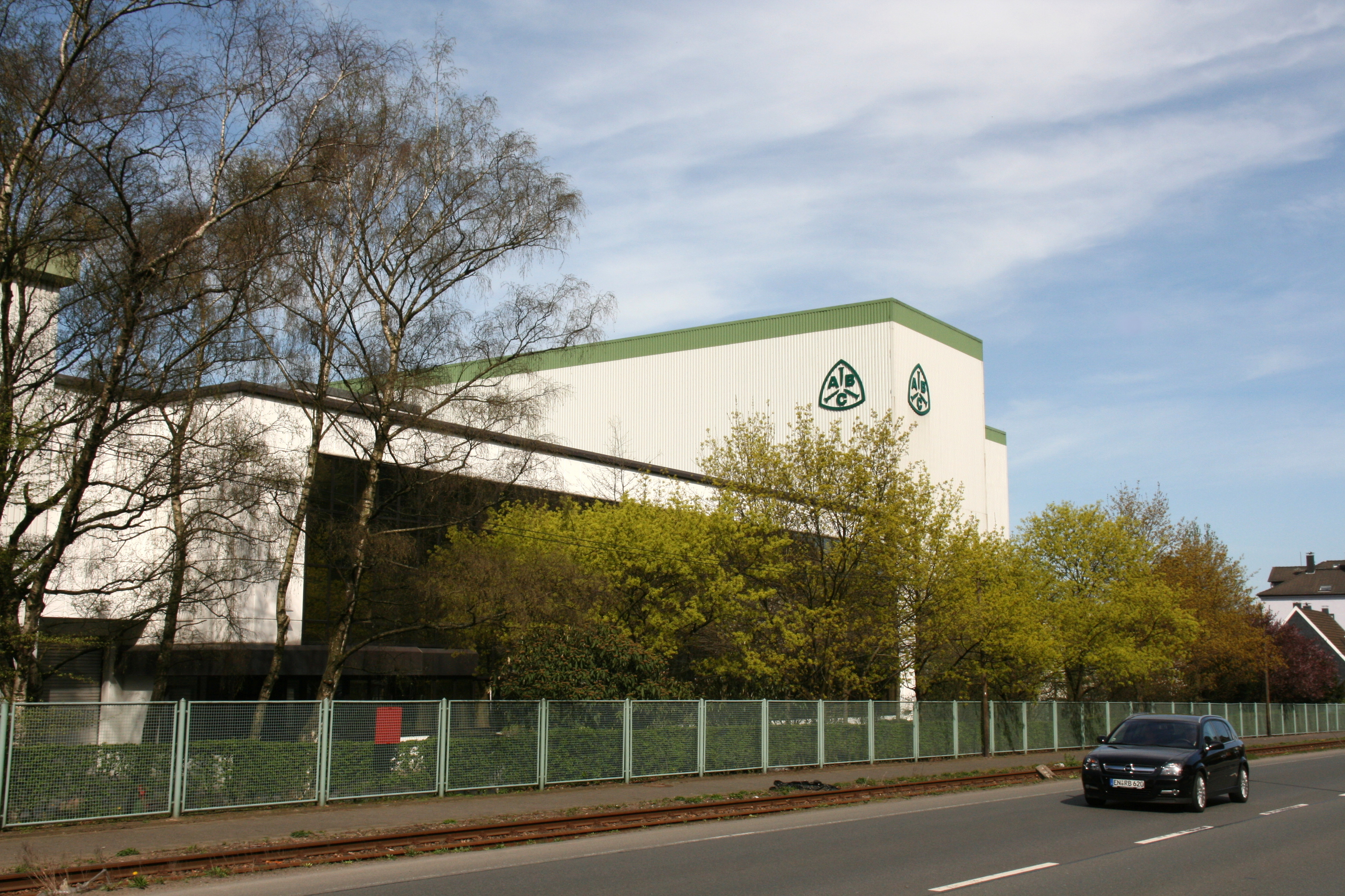 Altenloh, Brinck & Co, Zweigwerk an der Kölner Straße in Gevelsberg